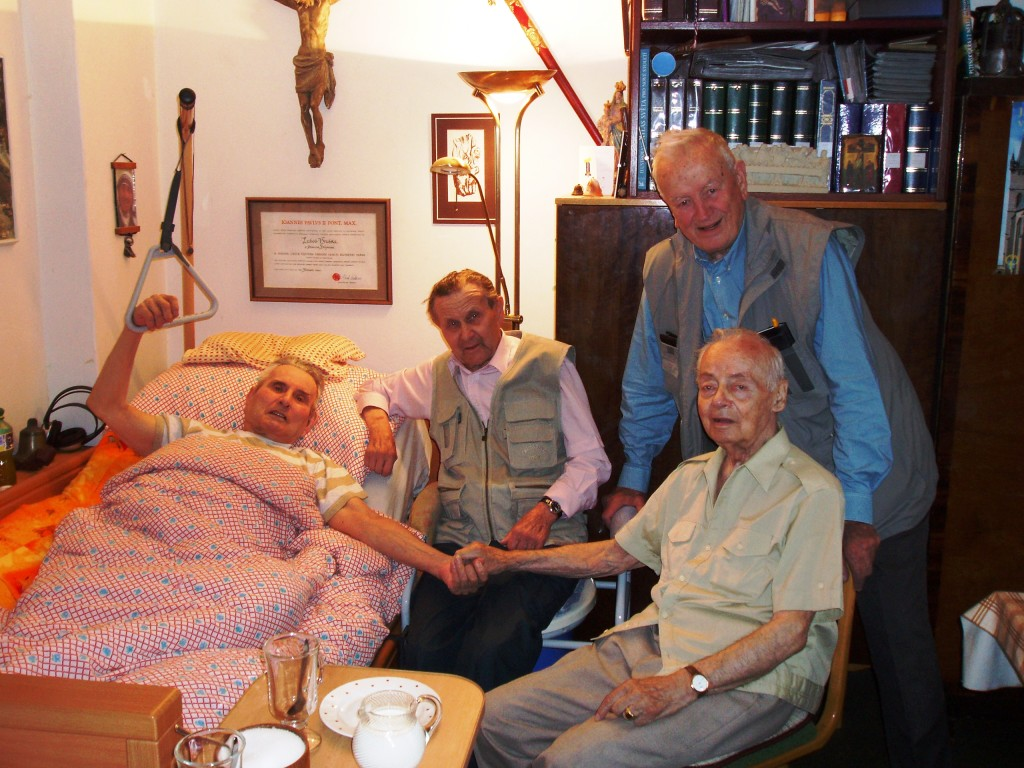 Nemocný Luboš Hruška s přáteli spolubojovníky, generálem Husníkem a generálem Káchou